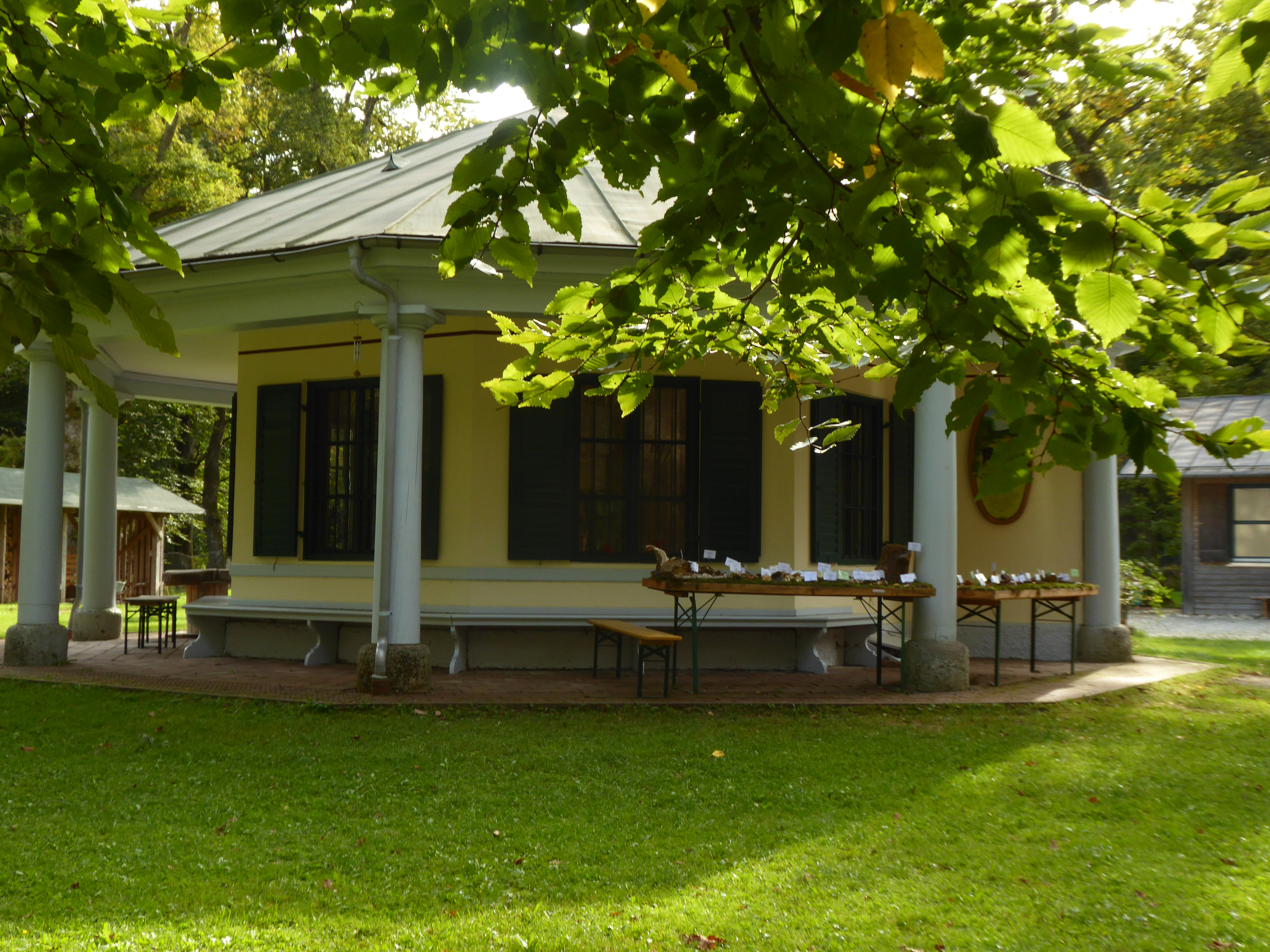 Ehemaliges Jagdhaus für Königin Marie von Bayern - heute Ausstellungspavillon im Walderlebniszentrum Grünwald Erdgeschossiger Pavillonbau mit Zeltdach und Eingangshäuschen 1863